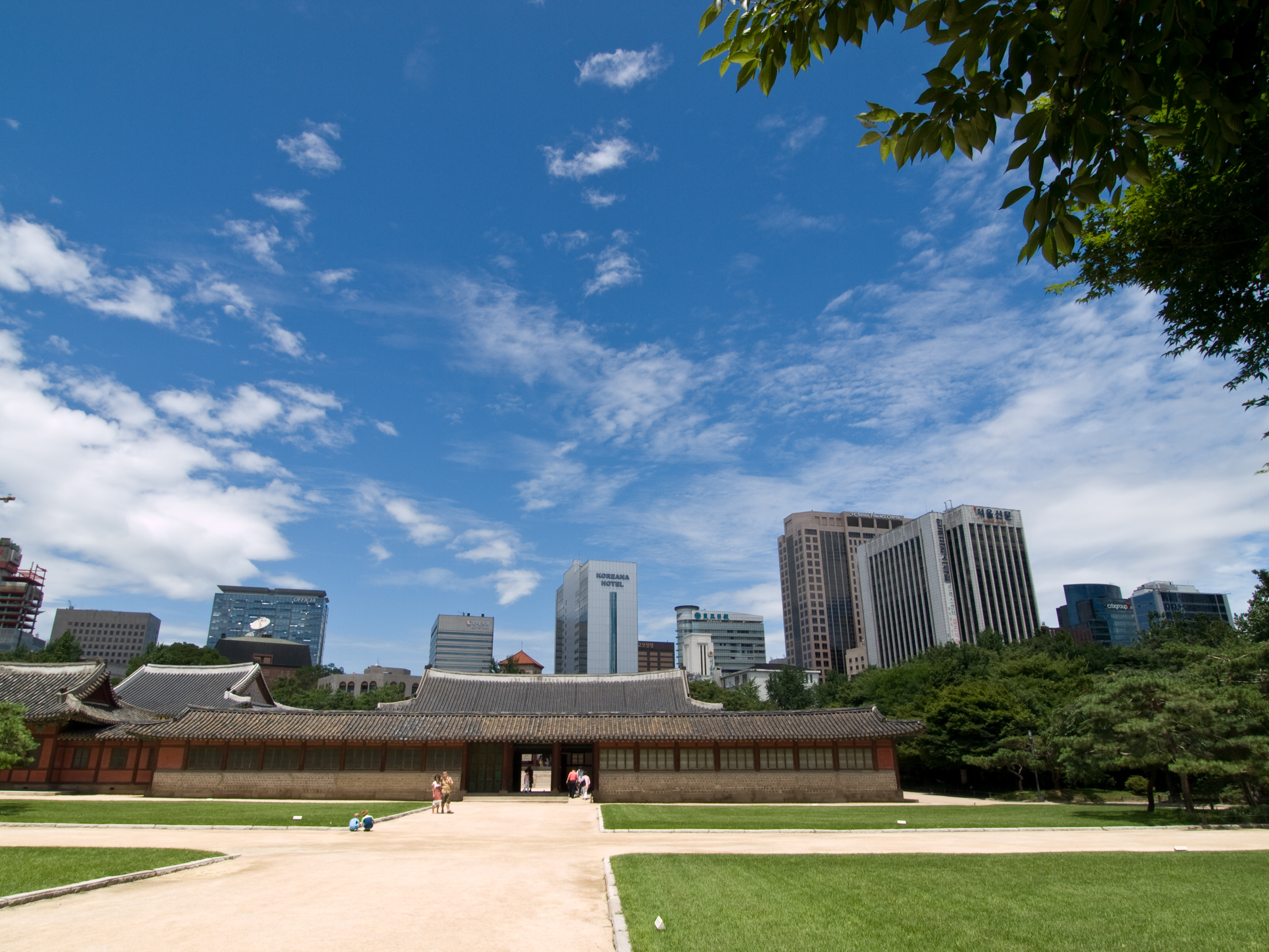 서울시 덕수궁, Deoksugung (Palace) in Seoul, Korea